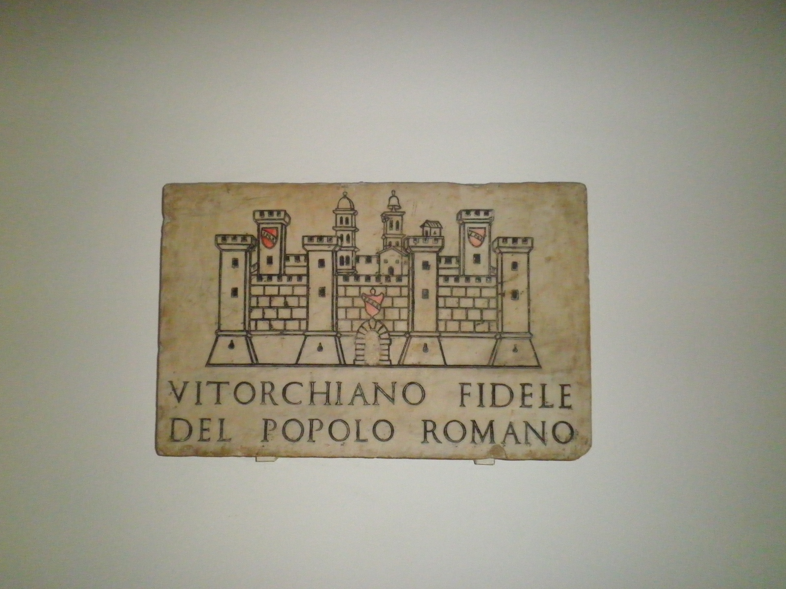 Roma, palazzo senatorio al Campidoglio. Sala del Carroccio. Emblema con il castello di Vitorchiano.